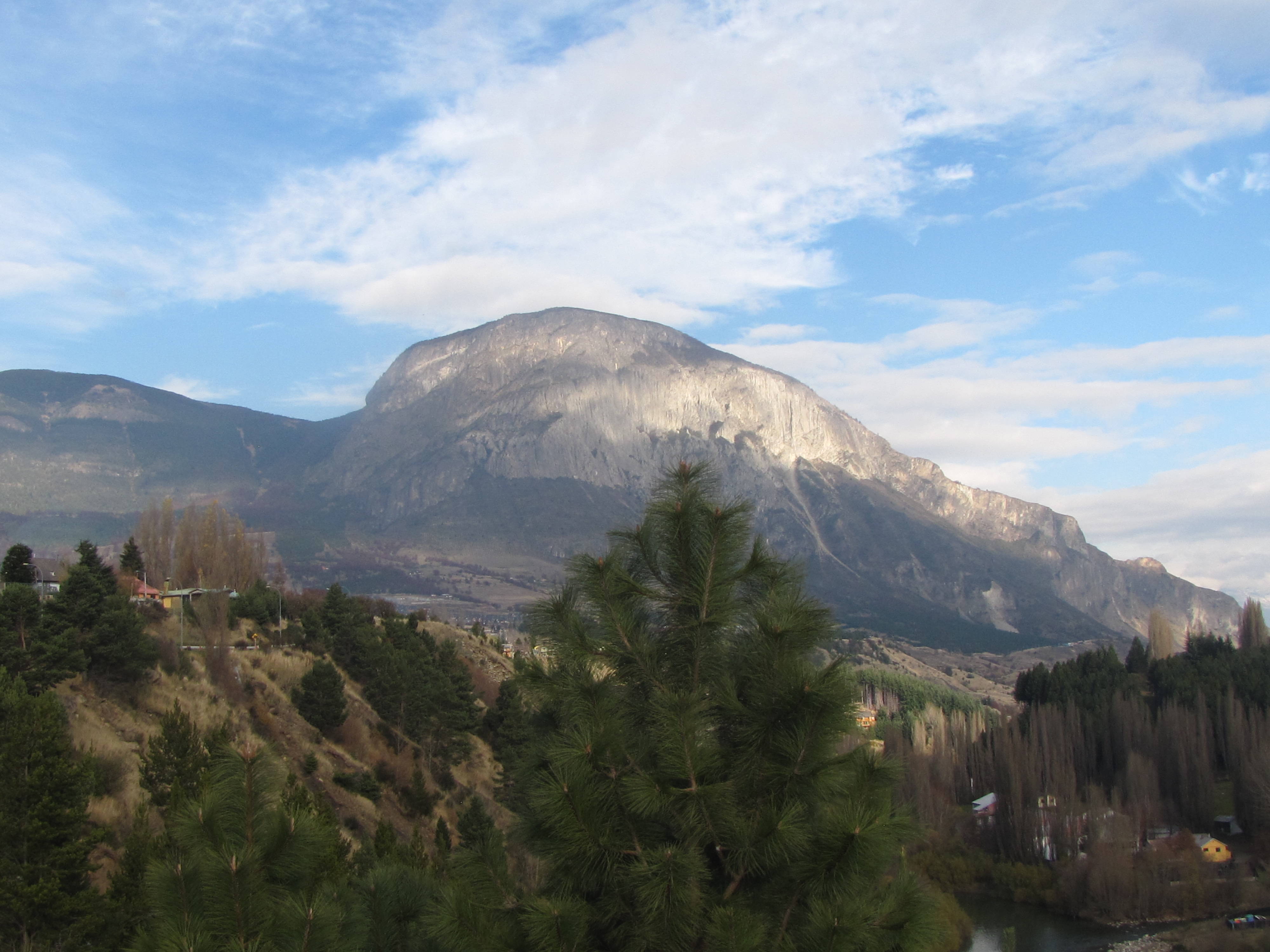 Cerro Mackay, al sur de Coyhaique, región de Aysén, Chile